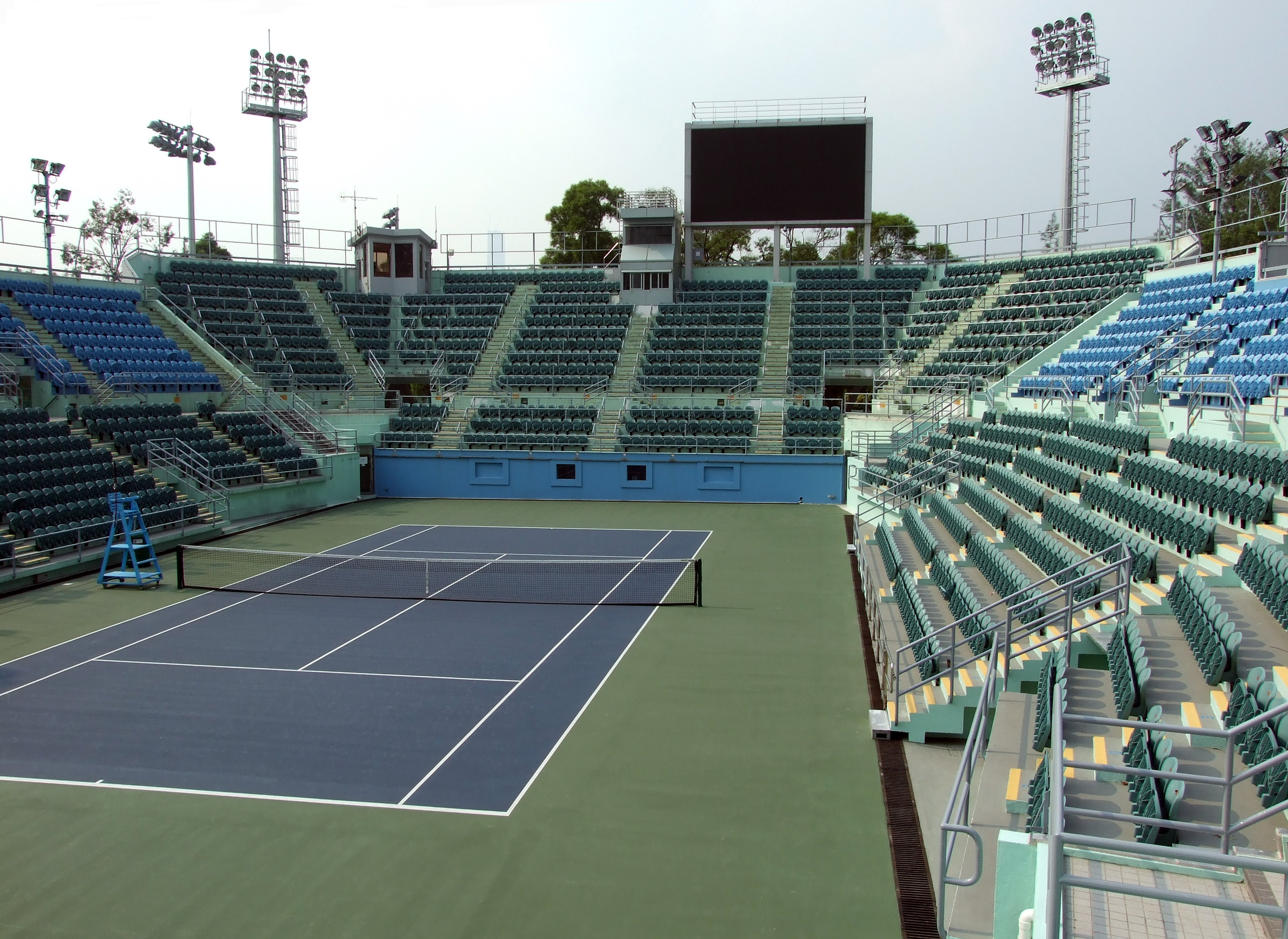 中文（香港）: 維多利亞公園網球中心